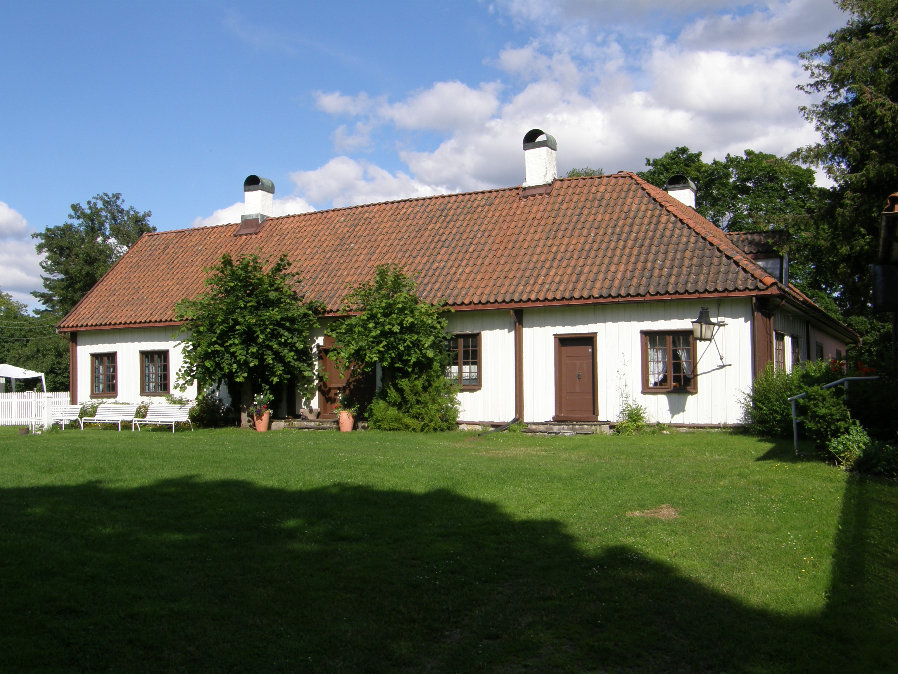 Riddergården, Hønefoss (våningshuset, vest)